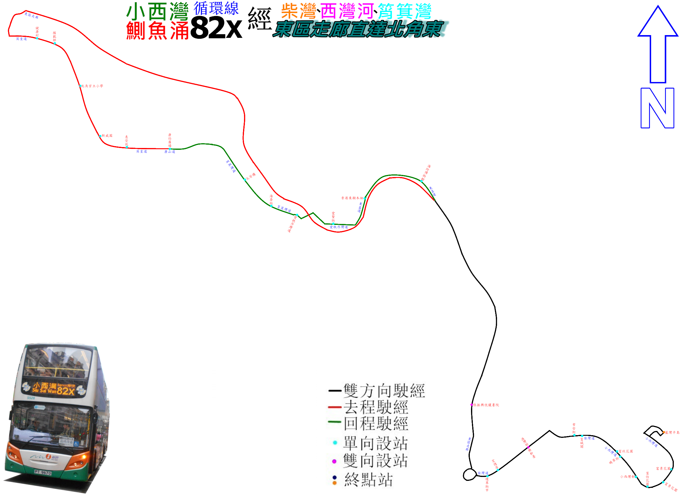 中文（香港）: 新巴82X線的走線圖